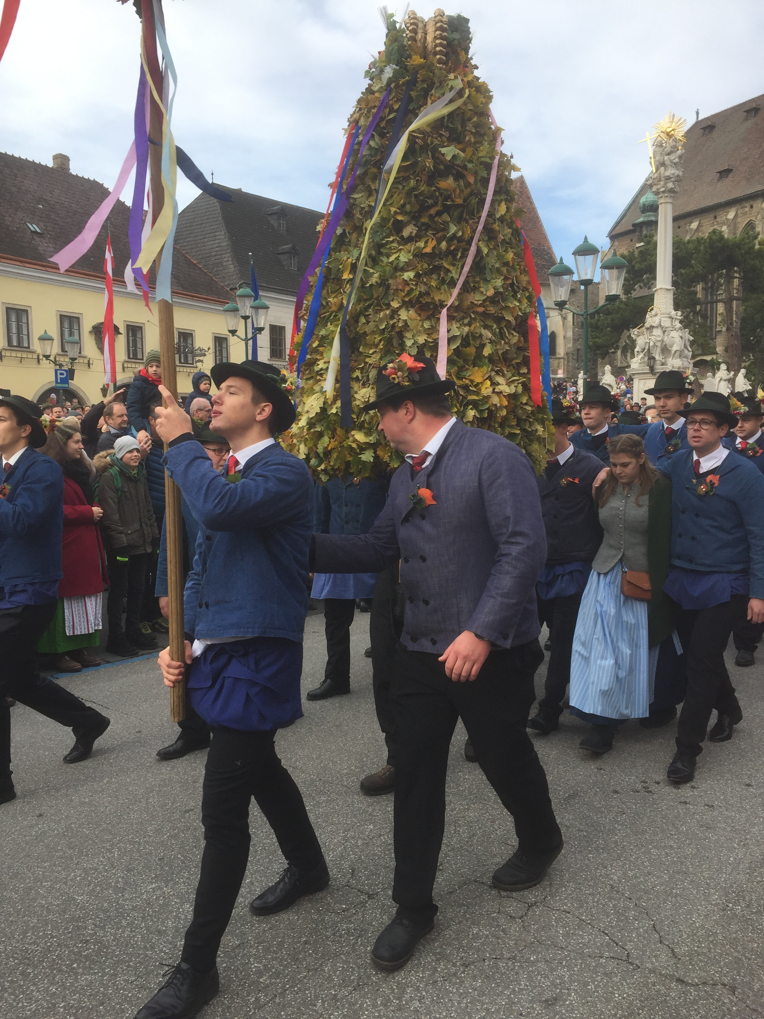 Traditioneller Hiataeinzug mit anschließenden Gstanzln (die reifen Trauben der Weingärten werden von „Hütern“ bewacht und nach der Weinlese ziehen diese Hüter mit einer drehenden geschmückten „Pritschn“ in einem Festzug ins Dorf und singen Gstanzln, d.h. Reime zu Melodie mit bissigem Inhalt über politische und gesellschaftliche Ereignisse) - Diese Tradition wurde in das UNESCO-Kulturerbe aufgenommen.